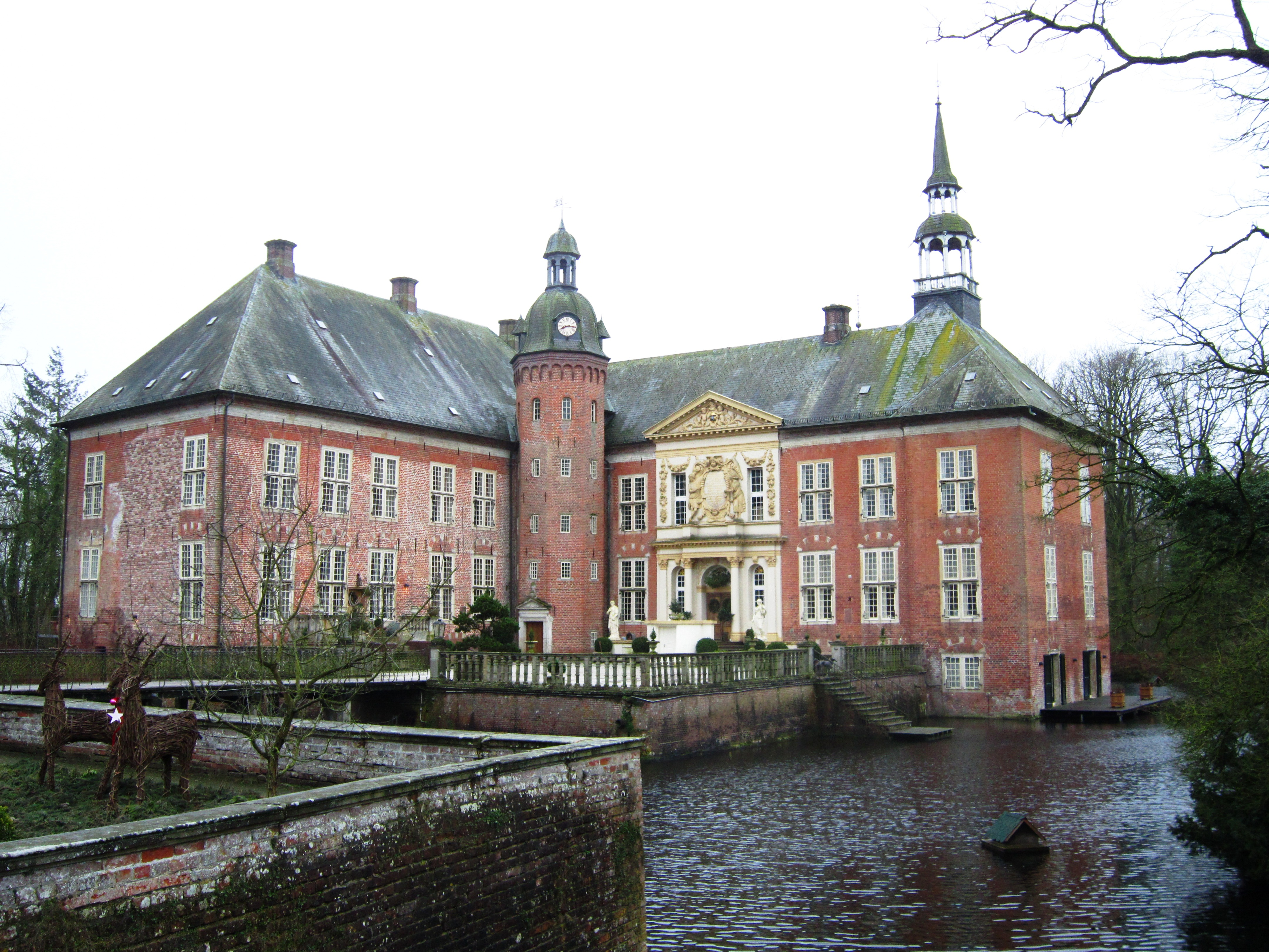 Schloss Gödens - Neustadtgödens - Sande